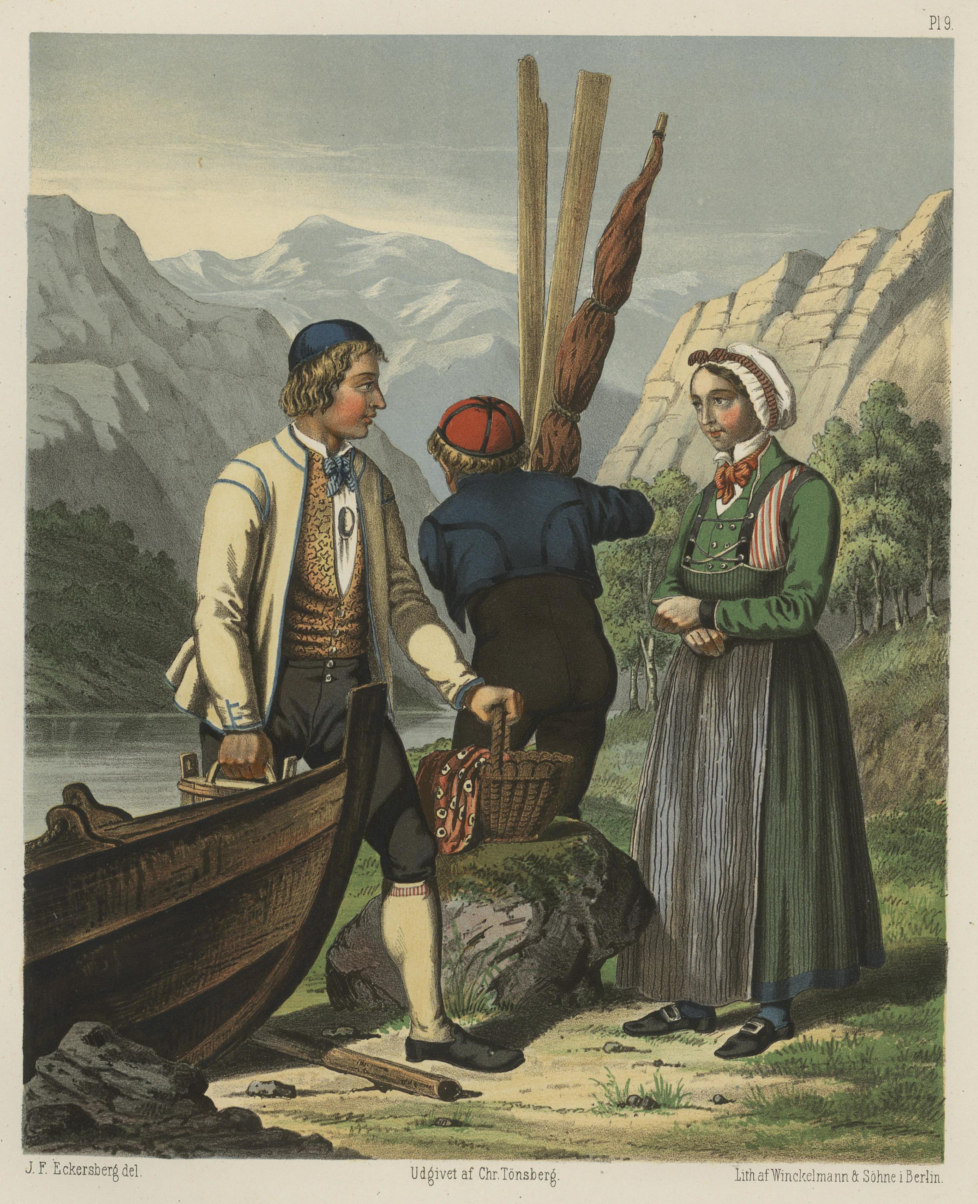 Illustrasjon hentet fra boken "Udvalgte norske Nationaldragter" av ukjent forfatter og utgitt av Chr. Tønsberg (no, [1861])